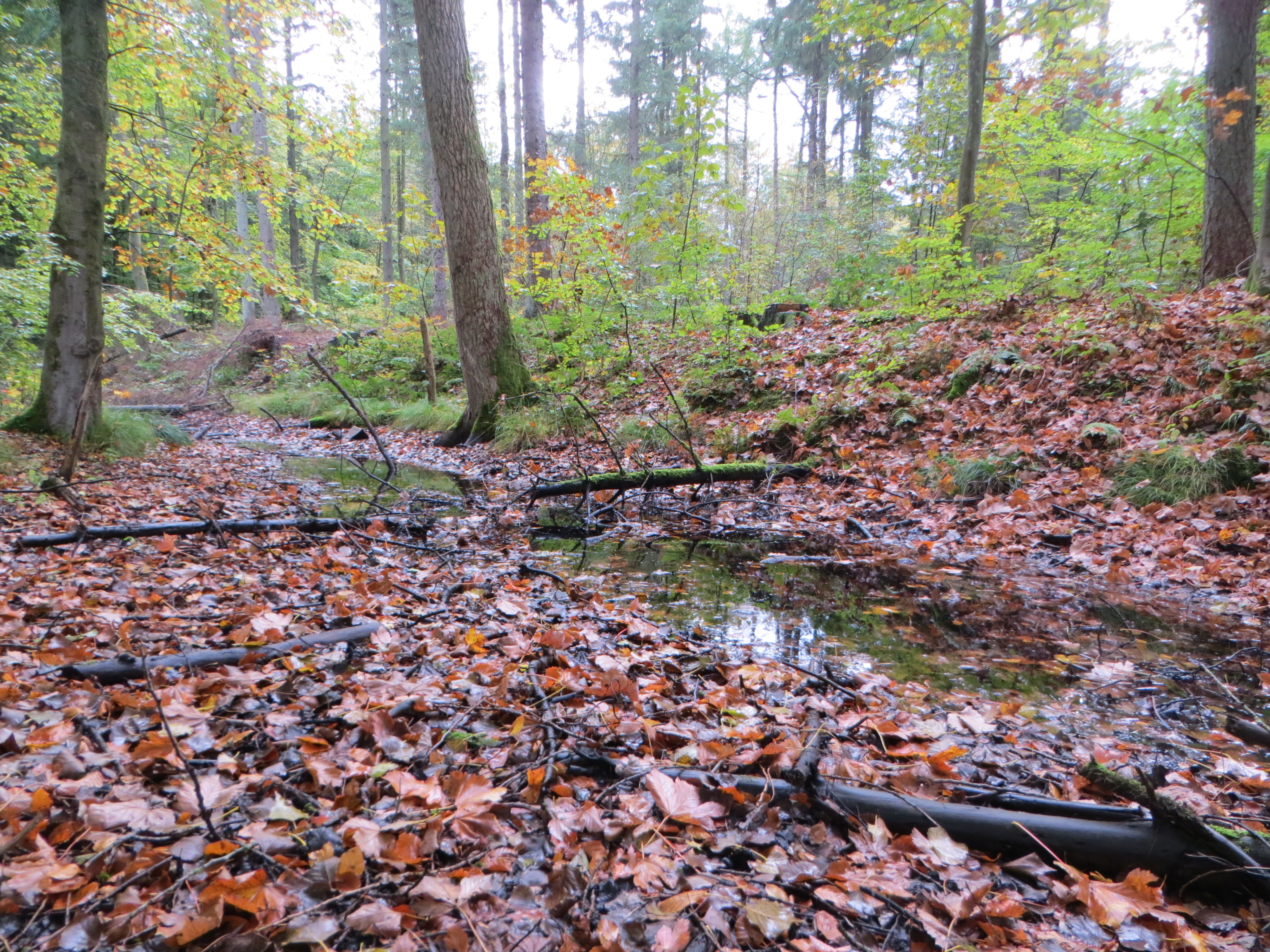 Anfang der Eddeboe auf dem Junkerplatz, Wall Ostseite von Osten, Marienhölzung, Flensburg 2013, Bild 01